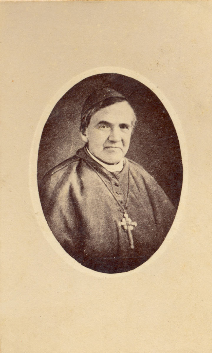 Domingo Antonio Riaño Martínez (* Sotaquirá (Boyacá), 12 de mayo de 1788 - † Ecuador, 20 de julio de 1866), fue un obispo colombiano de la Iglesia Católica Romana